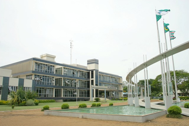 Paço Municipal de Toledo - PR